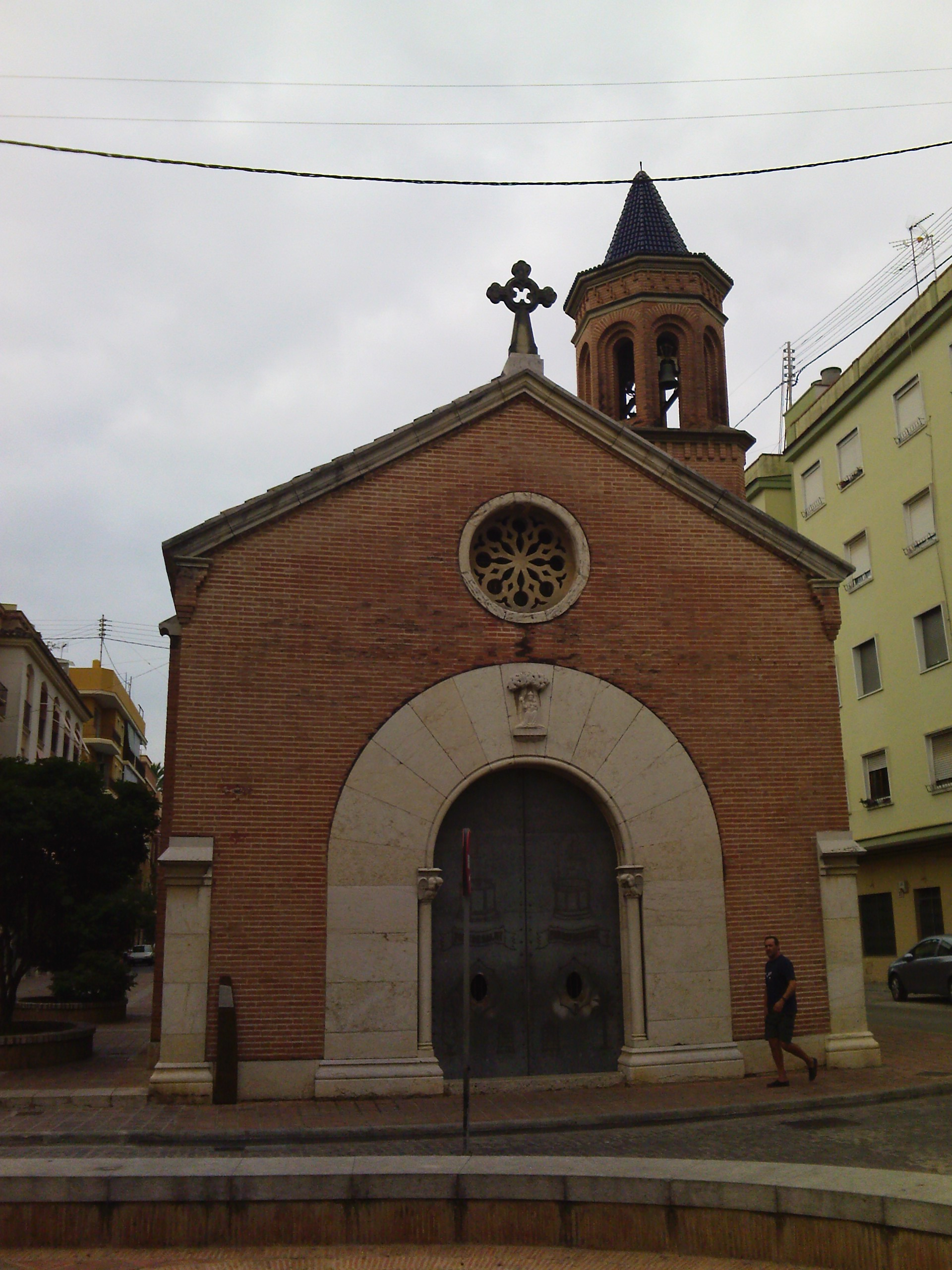 Capilla del hallazgo de Algemesí